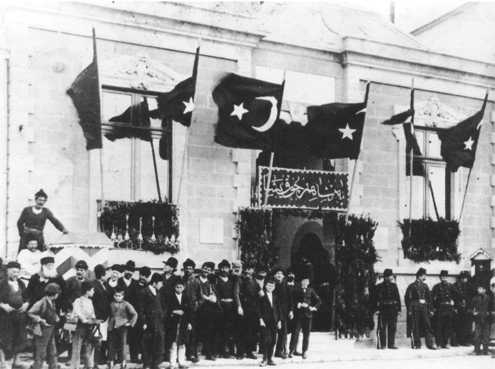 Ottoman Bank Mytilene Branch, 1906. SALT Research Ottoman Bank Archives Osmanlı Bankası Midilli Şubesi, 1906. SALT Araştırma Osmanlı Bankası Arşivleri